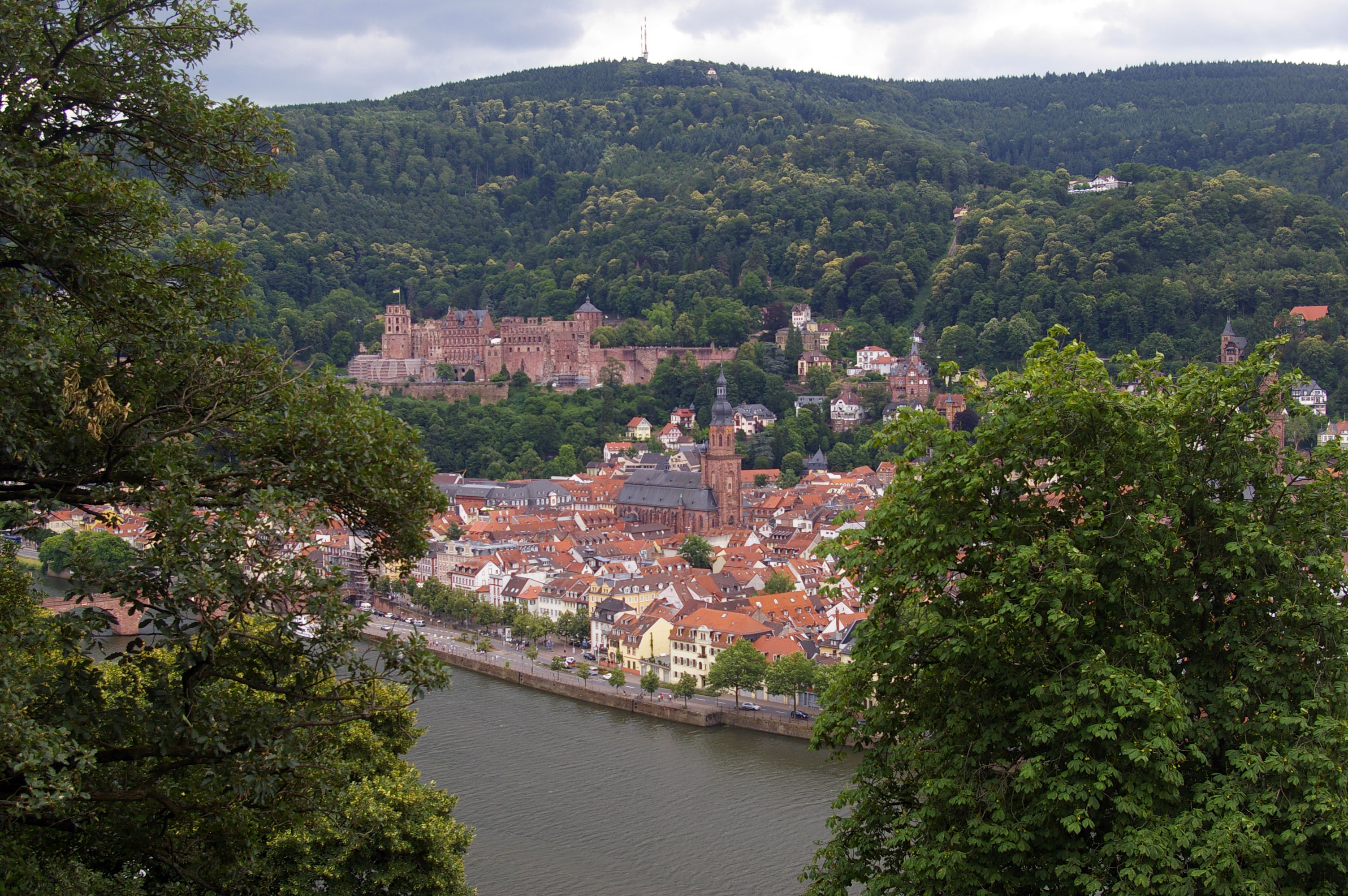 heidelberg promenada